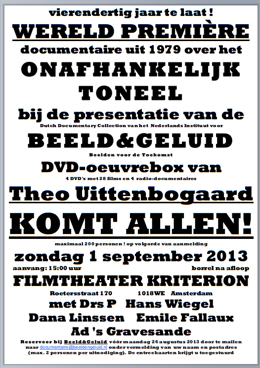 affiche